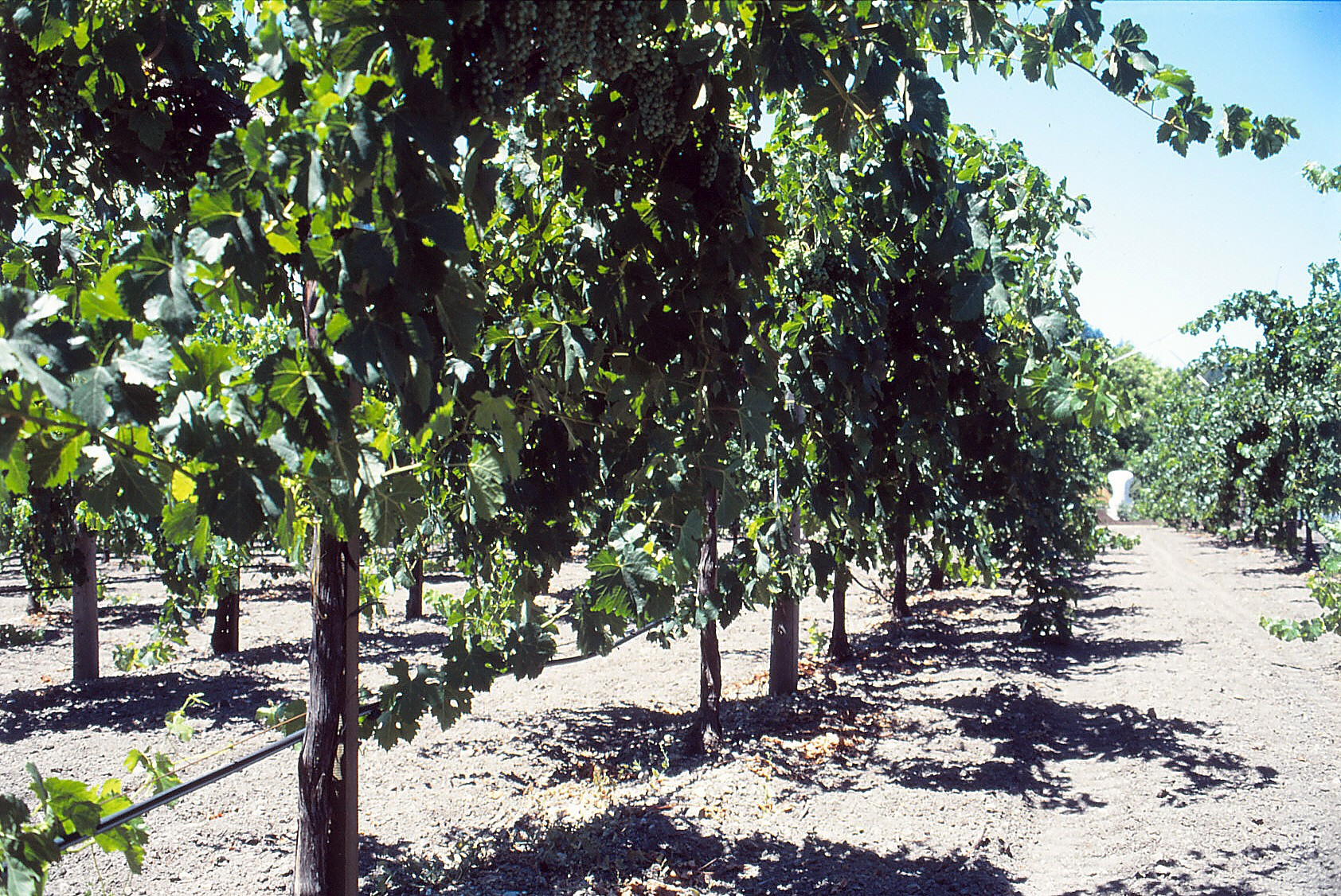 GDC Erziehung - Blick unter die vertikalen Laubvorhänge